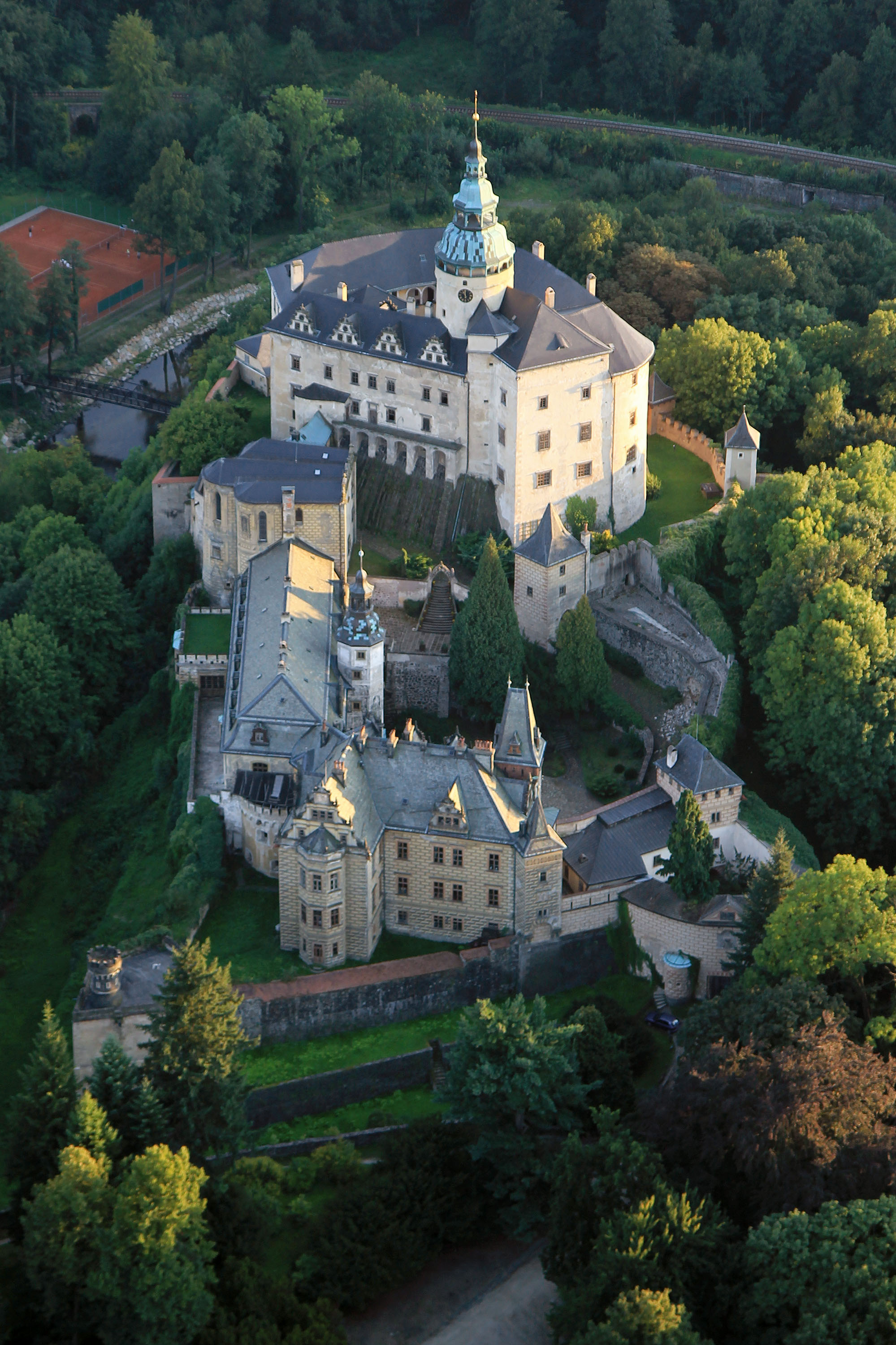 Hrad a zámek Frýdlant, Zámecká 4001, 4002, 4003, 4004, 4030, 4037, 4046, 4052, Frýdlant.